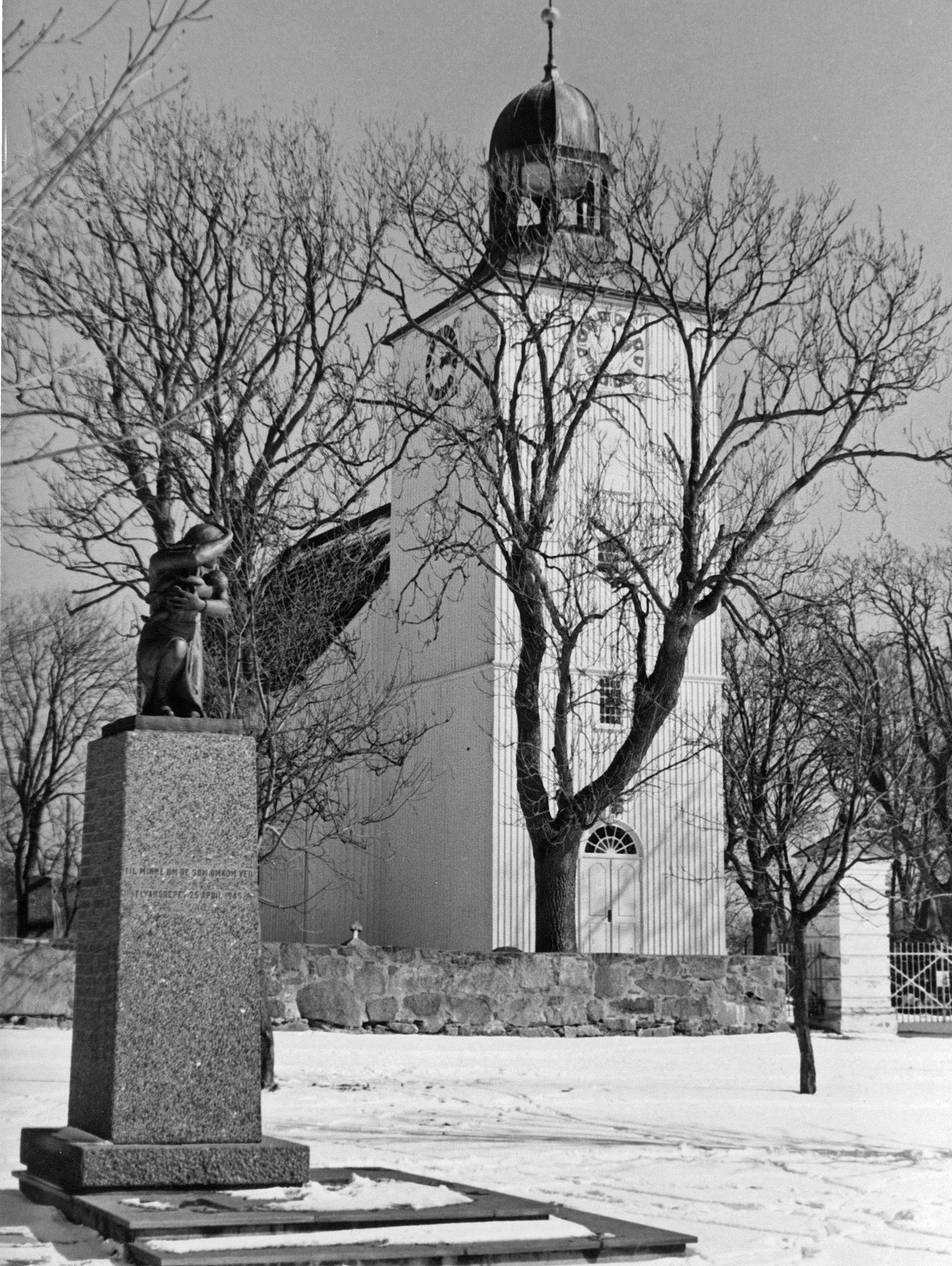 Bildet er hentet fra Arkivverket. Billedhogger Carl E Paulsen har laget den. Midlene som ble innsamlet til etterlatte fra bombingen ble delvis brukt til dette minnesmerket. Arkivinstitusjon : Statsarkivet i Stavanger Arkivnavn : Pa 1536 - Esso Norge as, Vallø Oljeraffineri og lager Sted : Norge, Vestfold, Tønsberg, Valløy Emneord: Olje, Oljeraffineri, Petroleum Avbildet